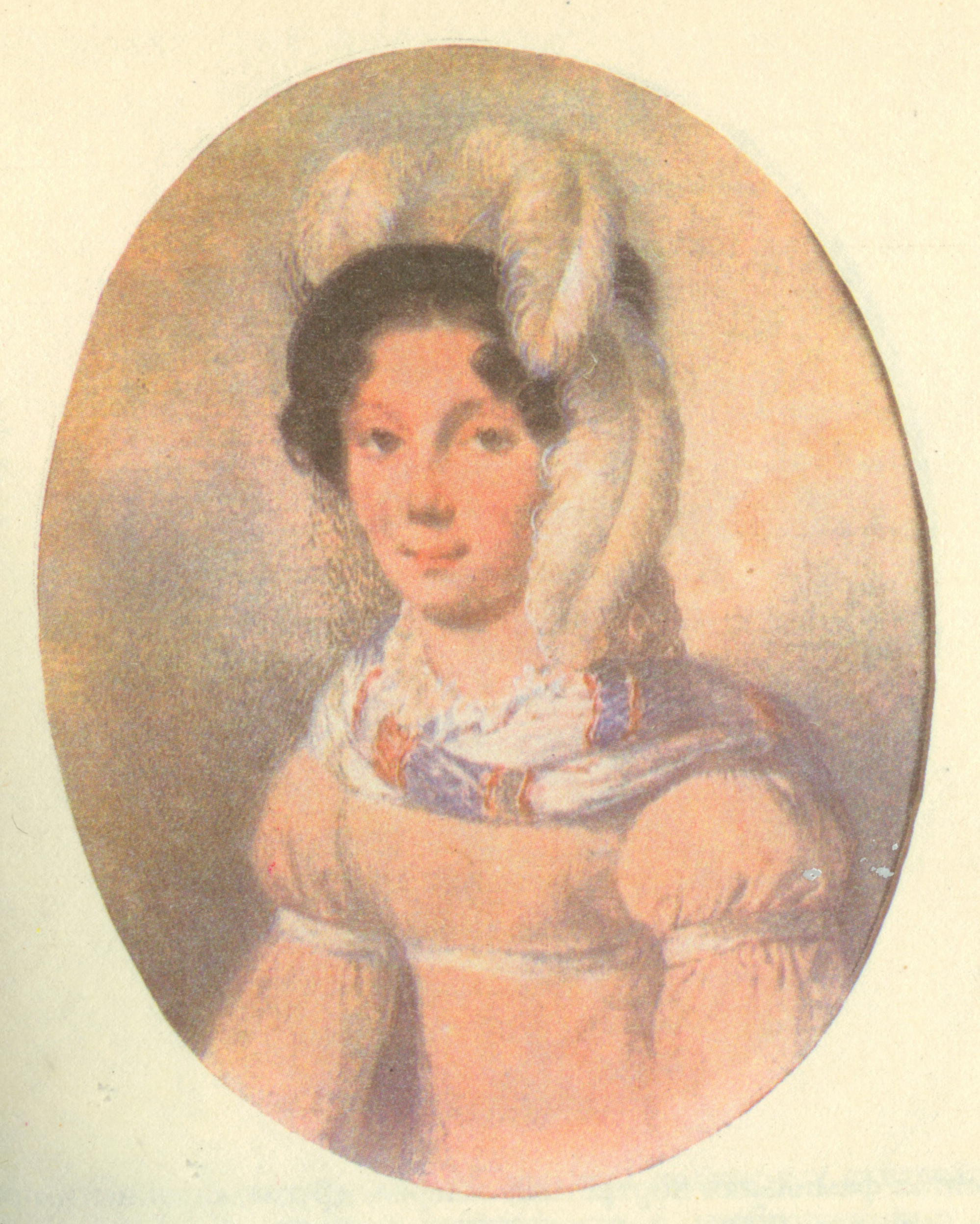 Графиня Елена Антоновна Апраксина (ум. 1820), урожденная герцогиня Серра—Каприола.